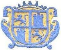 ESCUDO DE LA REAL CORONA ESPAÑOLA, ESCULPIDO EN LA FACHADA DE LA IGLESIA DE SAN AGUSTIN ACASAGUASTLÁN, Y QUE SIRVE DE ESCUDO DEL MUNICIPIO.